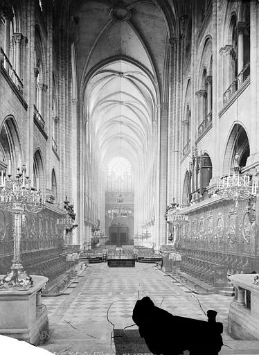 Vue intérieure de la nef, vers l'entrée